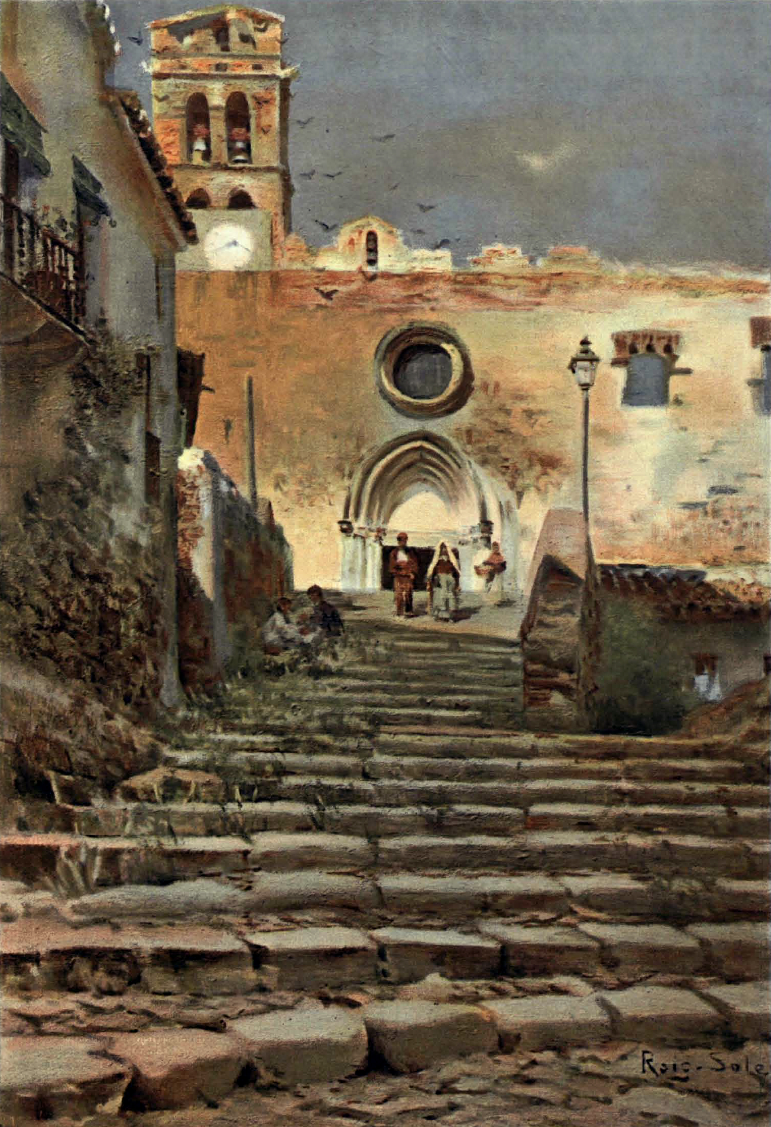 Iglesia parroquial de Blanes (Cataluña).